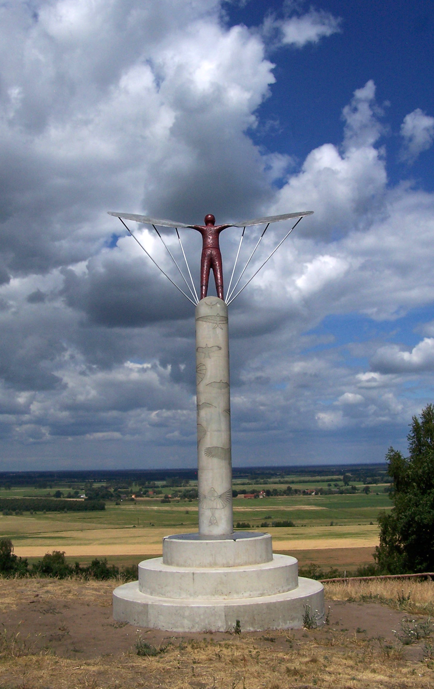 Die Wiege der Luftfahrt, der Gollenberg im Havelland – Seine erfolgreichsten Flugversuche gelangen dem Luftfahrtpionier Otto Lilienthal bei Stölln (Gemeinde Gollenberg) im brandenburgischen Ländchen Rhinow zwischen 1893 und 1896.